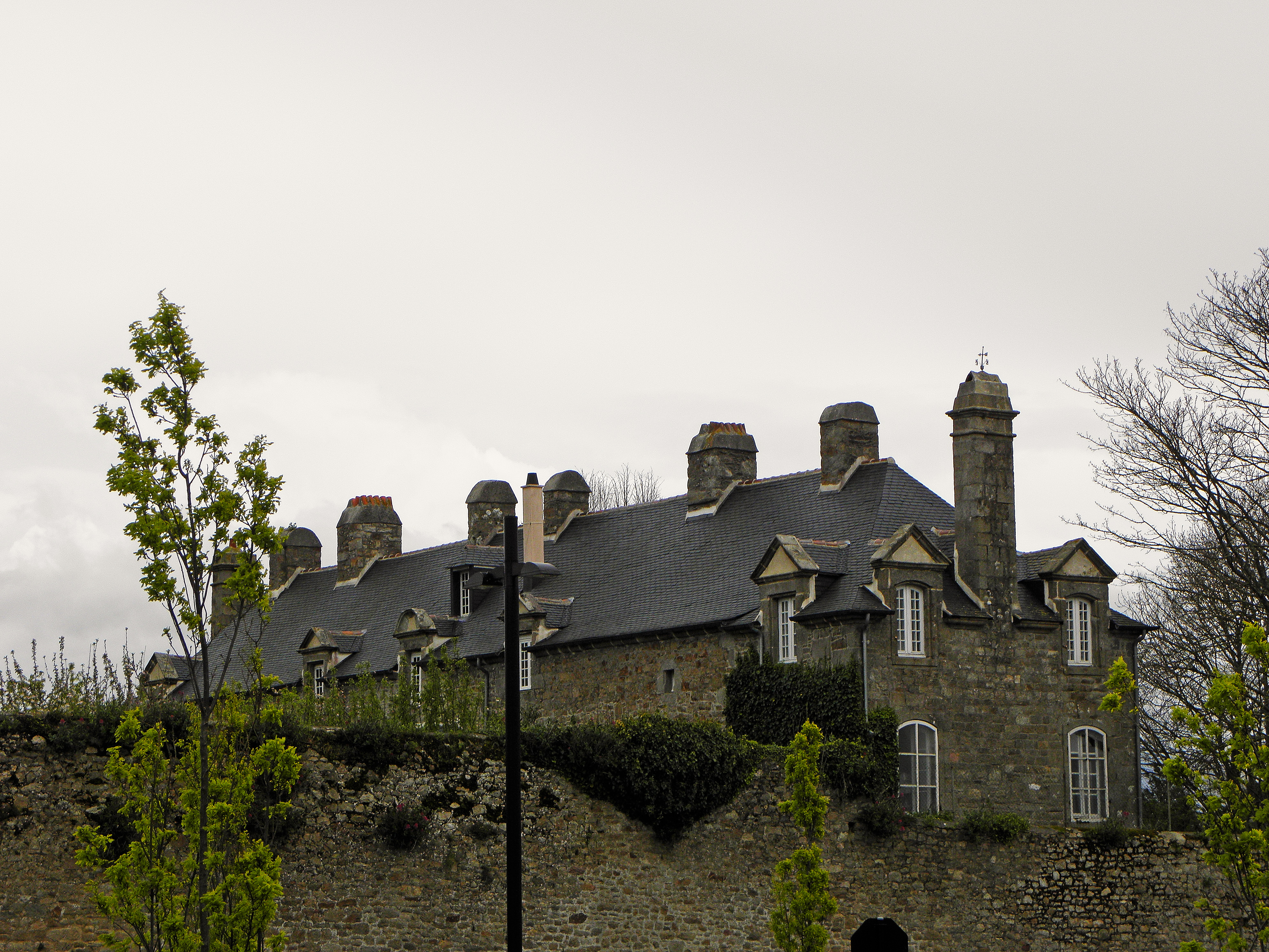 Hôtel particulier sis 11 rue des Vieilles Ursulines en Saint-Pol-de-Léon (29).